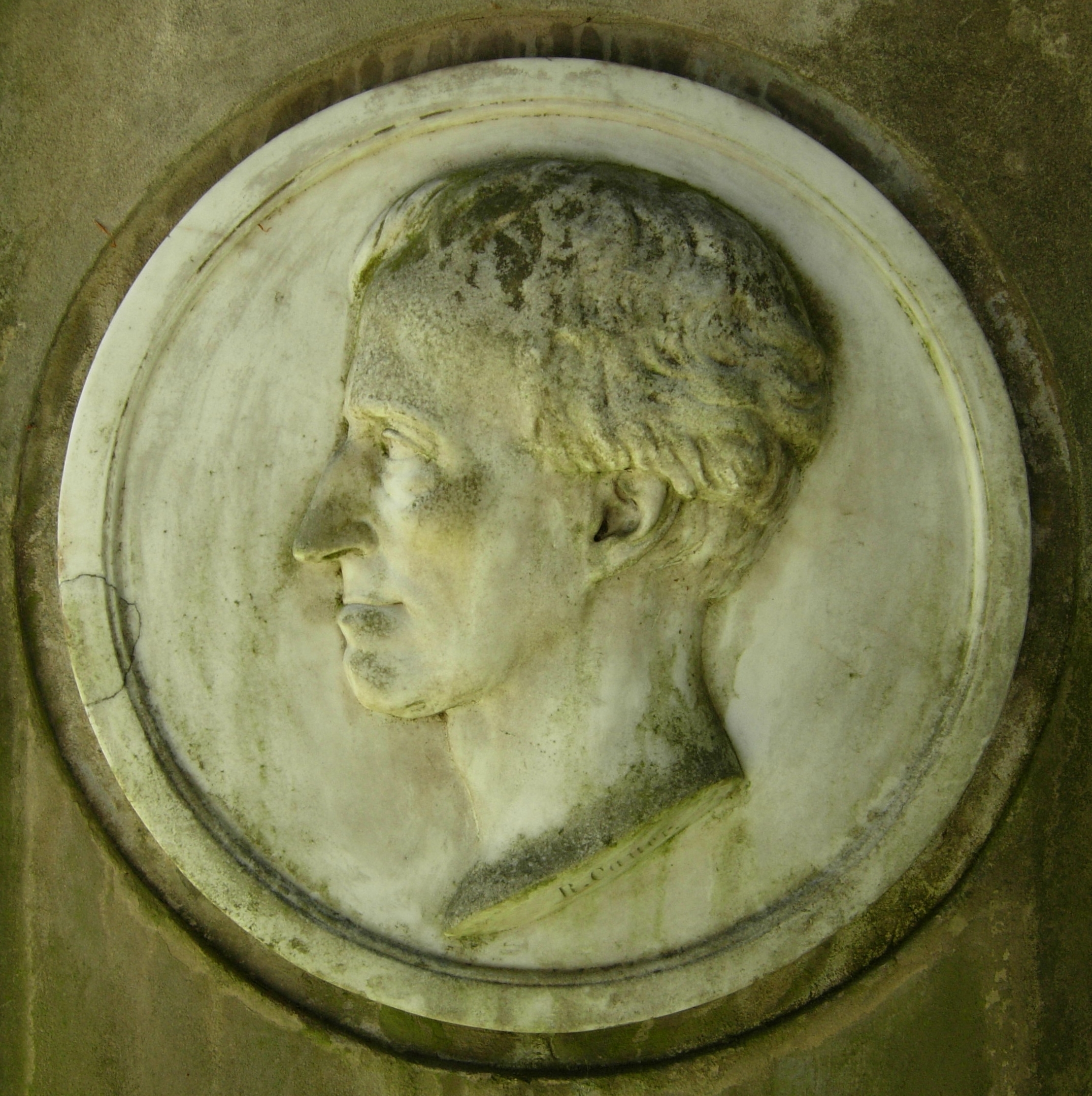 Robert Cauer der Ältere: Grabmedaillon für den Altphilologen Friedrich Gottlieb Welcker auf dem Alten Friedhof Bonn (der in den Grabstein gravierte Name lautet F. Th. Welcker, dabei steht Th. für Theophil, die griechische Bezeichnung für Gottlieb)